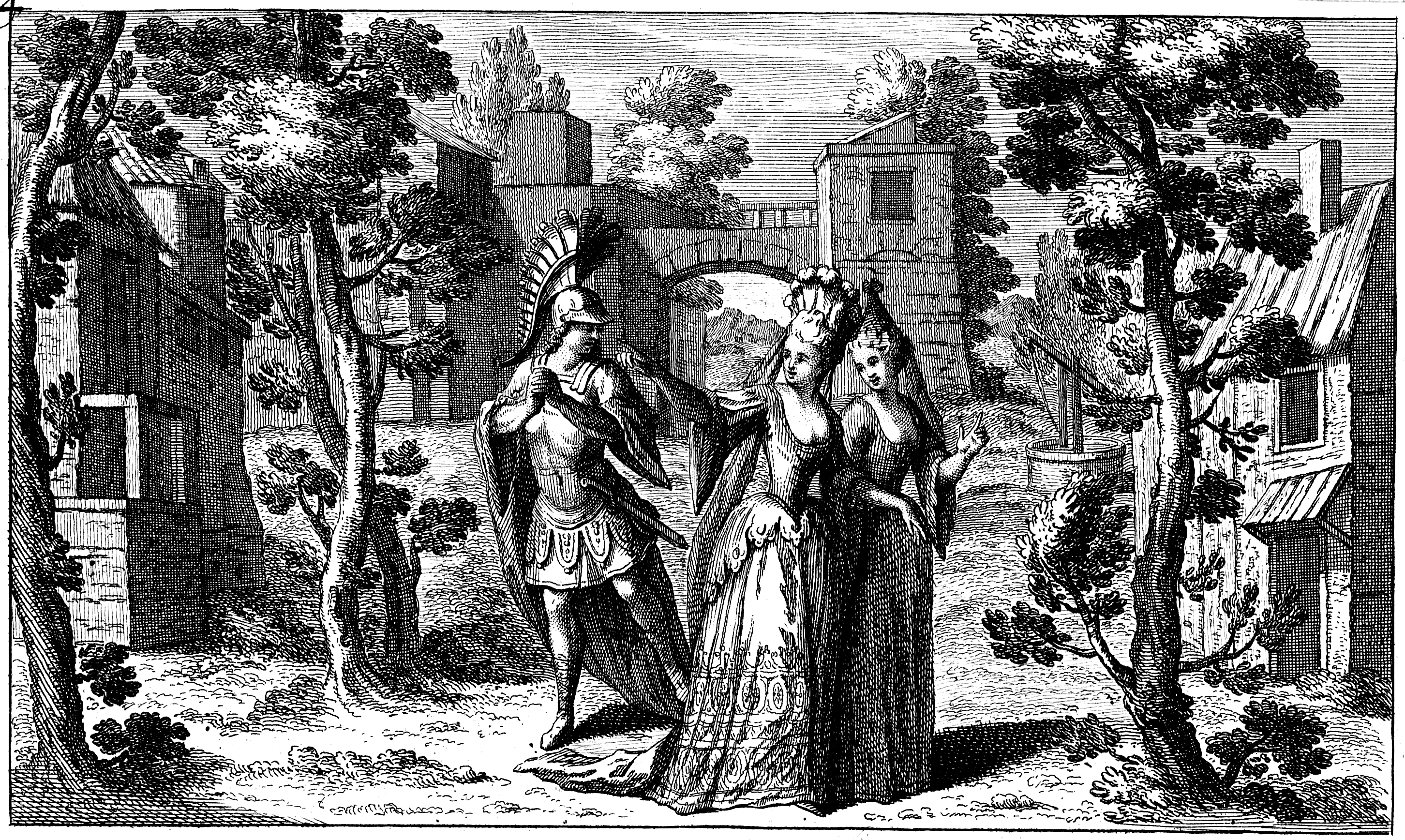 Jean-Baptiste Lully - Roland - Acte 1 - Paris 1685